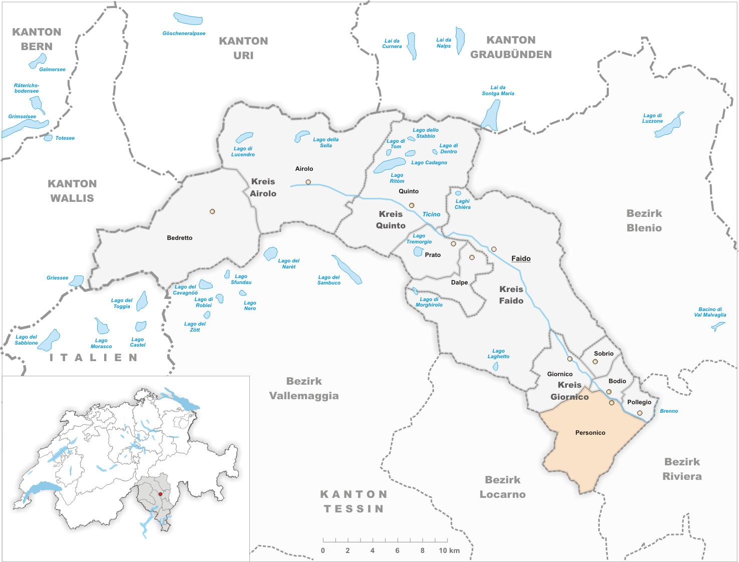 Municipality Personico